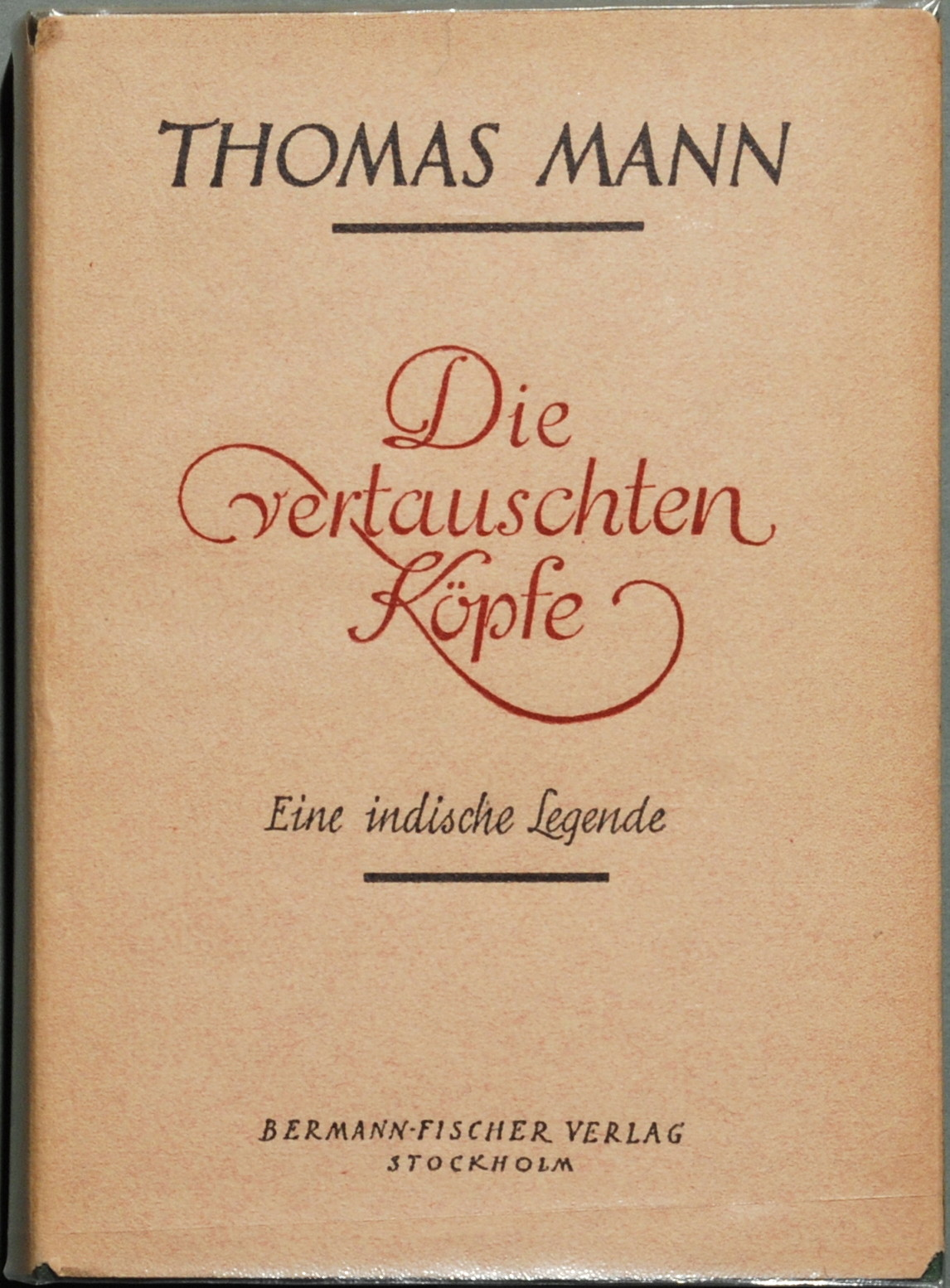 Thomas Mann: Die vertauschten Köpfe. Eine indische Legende. Stockholm: Bermann-Fischer 1940, 230 Seiten. Erstdruck (Potempa E 31.1, Bürgin I 62, Wilpert/Gühring² 79). Orig.-Leinen 17 x 11,5 cm, Orig.-Schutzumschlag in Klarsichtfolie eingelegt.